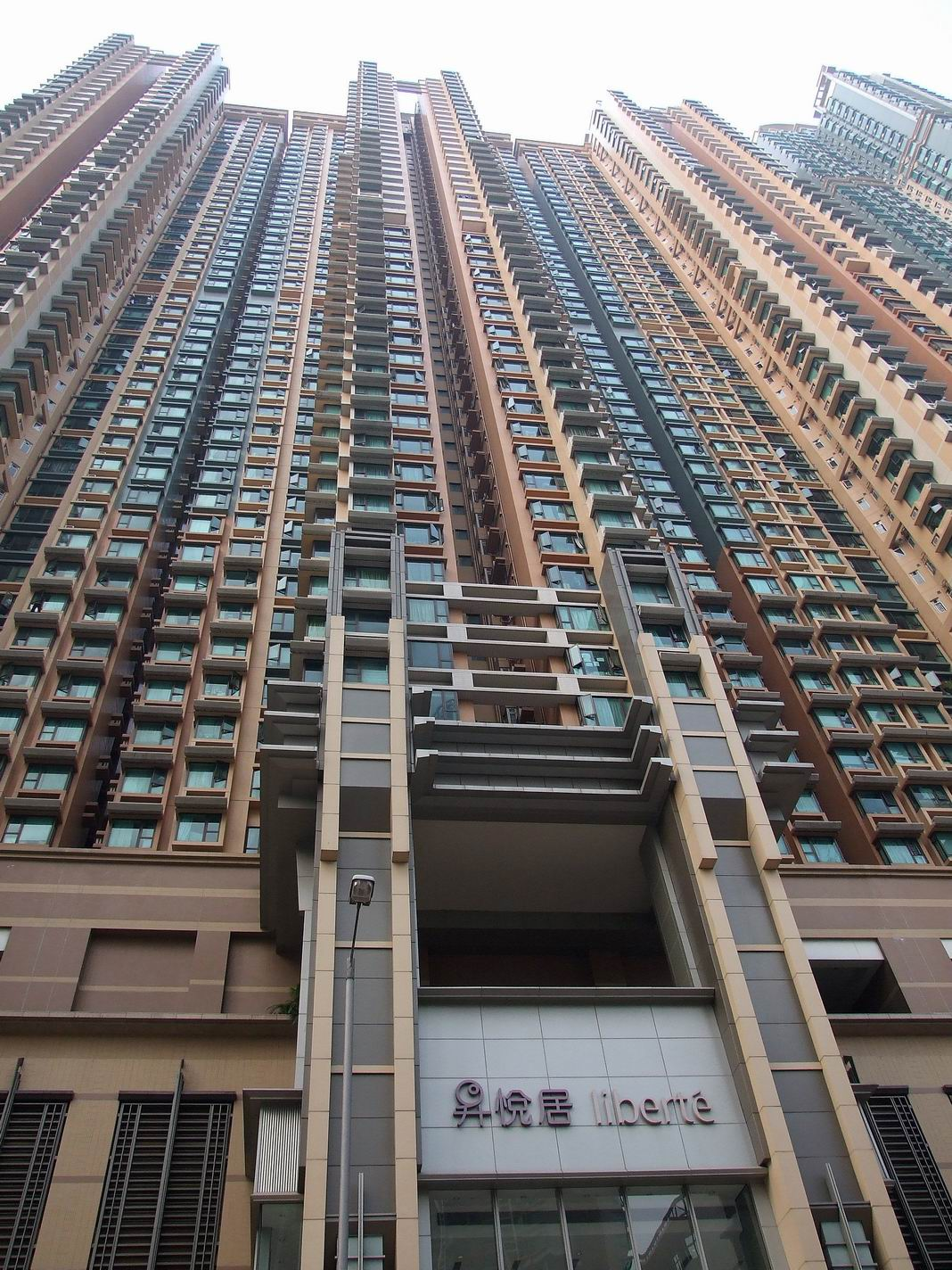 昇悅居